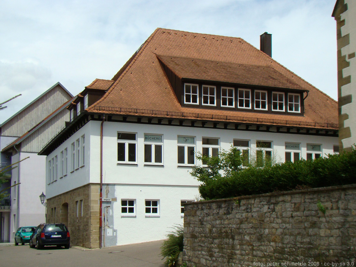 Alte Kelter (1817/18) in Gemmrigheim, umgebaut zur Schule 1949/59.